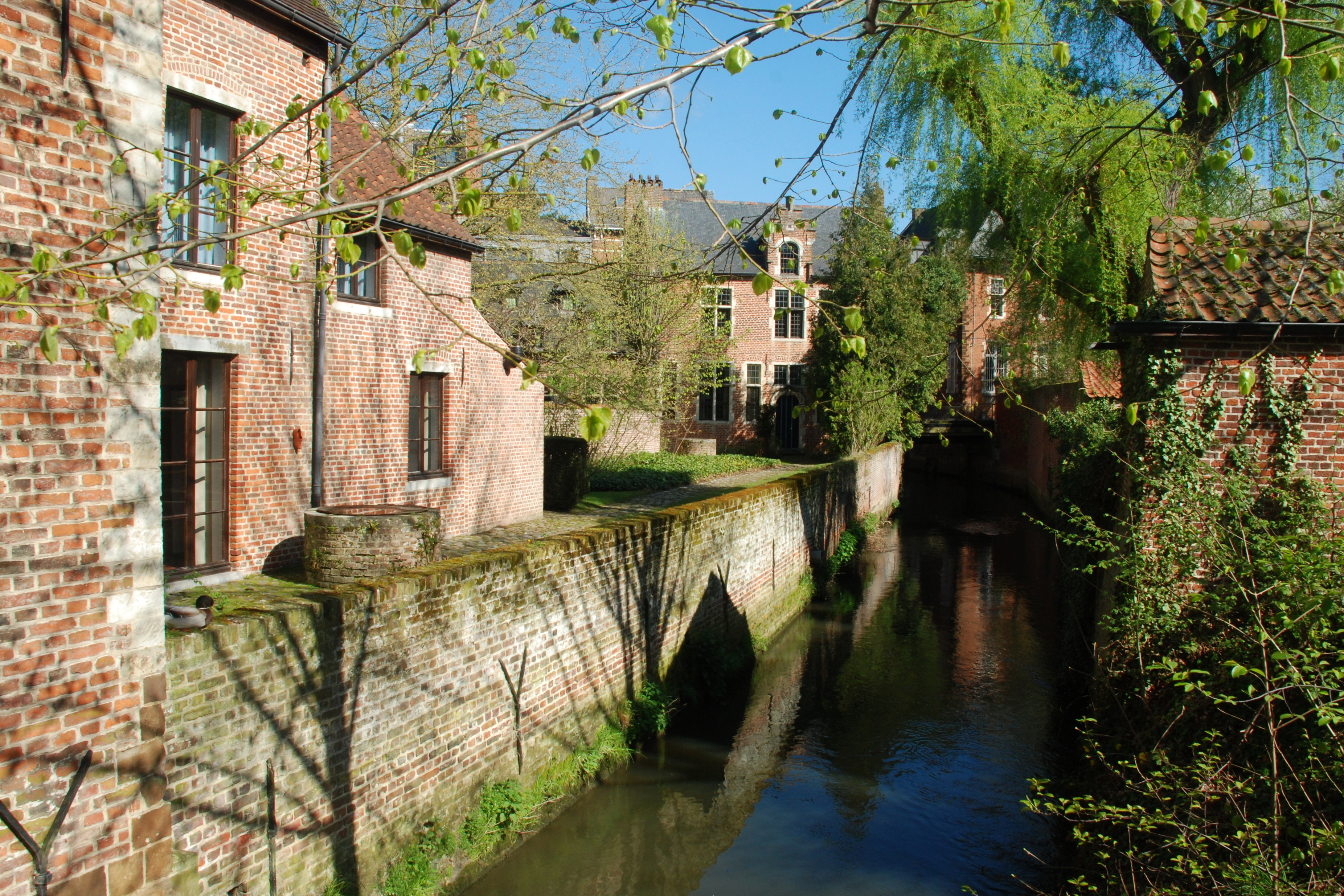 Belgium - Leuven - Groot Begijnhof - vue sur la Dyle jusqu'à la rue des Sœurs noires